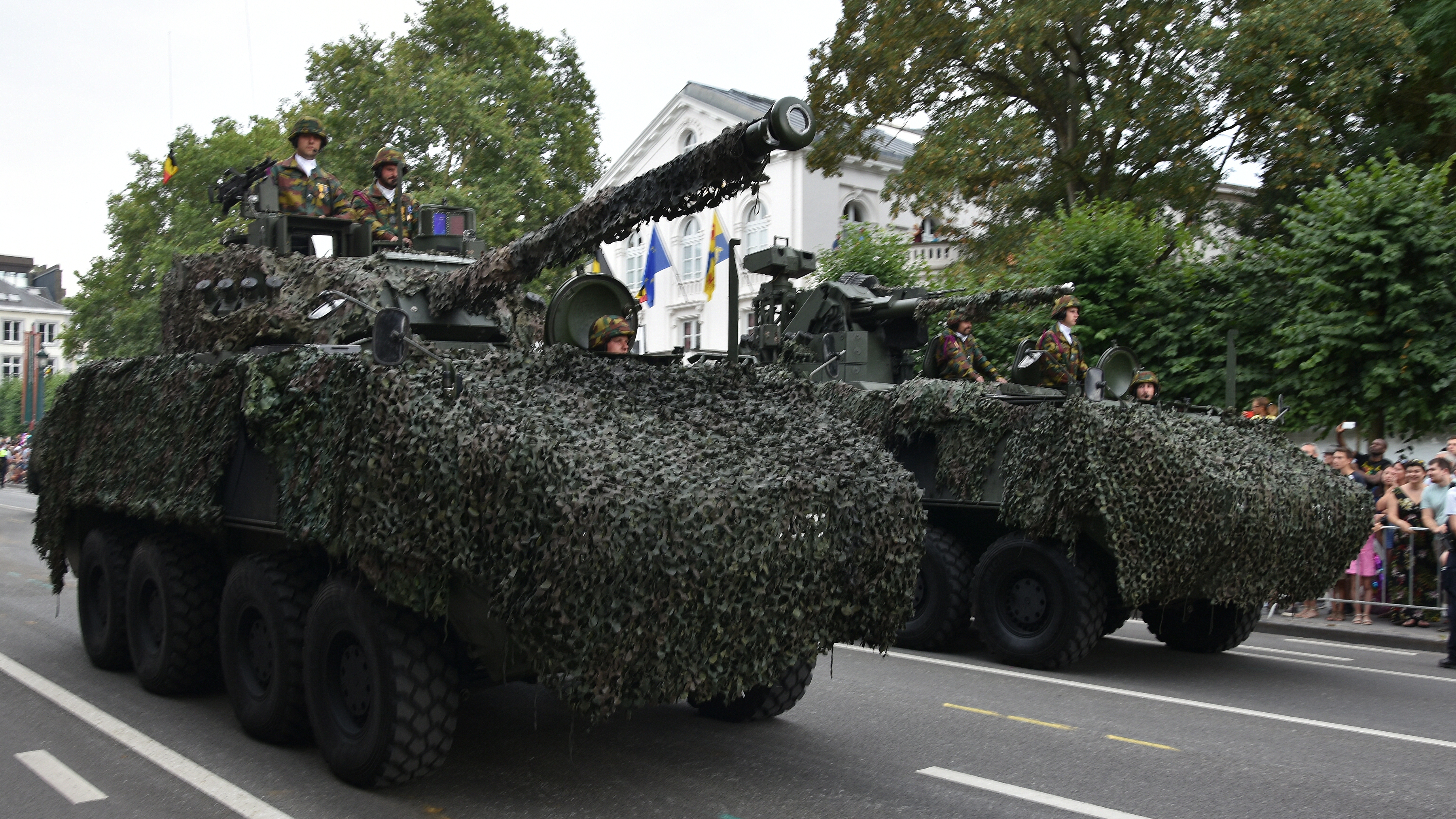 Piranha DF90 - Nationaal defilé 2018 21-07-2018 16-40-022 This photo of immaterial heritage has been taken in the Brussels Capital Region